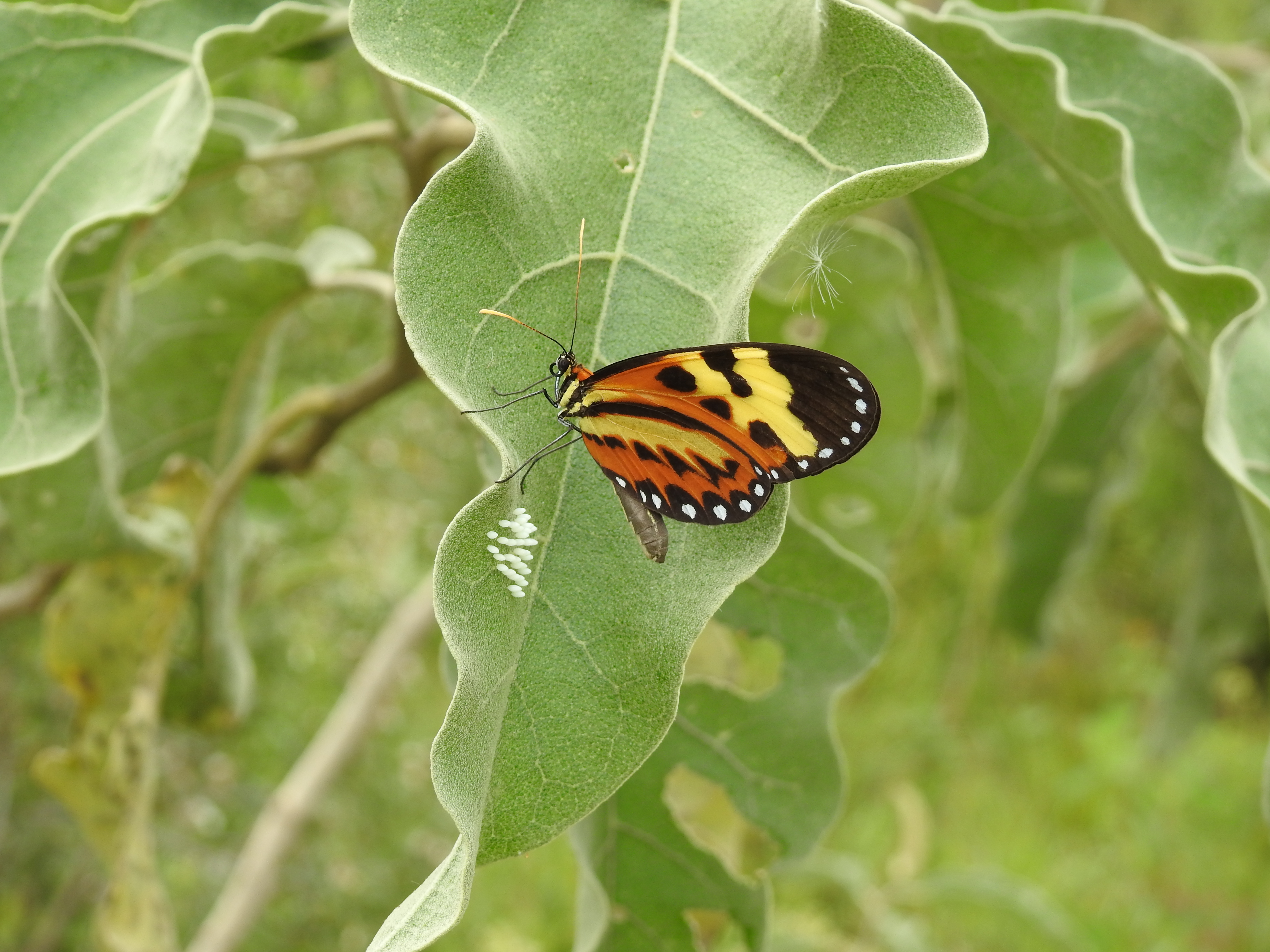 Foto tirada em Entre Rios de Minas - MG